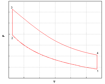 eigen afbeelding, geen auteursrecht